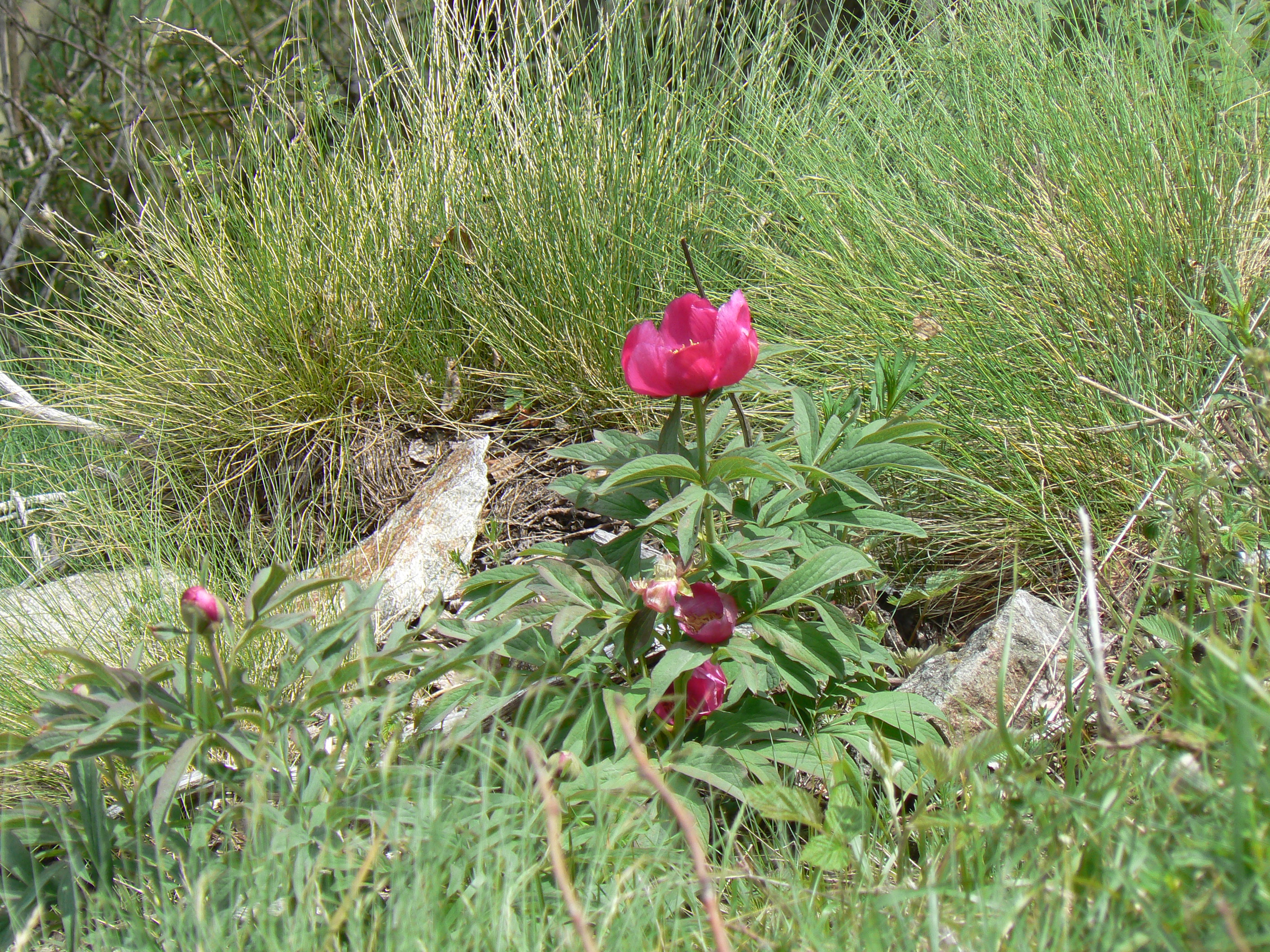 Sito di interesse comunitario Stazione di Paeonia officinalis subsp. officinalis del Col Fenêtre (SIC: IT1205110). Perloz, Valle d'Aosta, Italia.